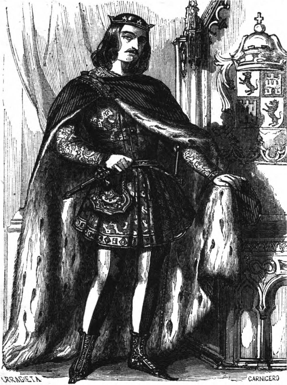 Grabado decimonónico que representa al rey Fernando IV de Castilla (1285-1312). Fue hijo del rey Sancho IV de Castilla y de la reina María de Molina. Durante su minoría de edad, su crianza y la custodia de su persona fueron encomendadas a su madre, la reina María de Molina, mientras que su tutoría fue confiada al infante Enrique de Castilla el Senador, hijo de Fernando III de Castilla. Durante su minoría de edad, y también durante el resto de su reinado, su madre procuró aplacar a la nobleza, se enfrentó a los enemigos de su hijo, e impidió en varias ocasiones que Fernando IV fuese destronado. Durante su reinado hubo de enfrentarse a la insubordinación de la nobleza, capitaneada en numerosas ocasiones por su tío, el infante Juan de Castilla el de Tarifa, y por Juan Núñez II de Lara, quienes fueron apoyados en algunas ocasiones por don Juan Manuel, nieto de Fernando III. Al igual que sus predecesores en el trono, Fernando IV prosiguió la empresa de la Reconquista y, aunque fracasó en su intento de conquistar Algeciras en 1309, conquistó la ciudad de Gibraltar ese mismo año, y en 1312 fue conquistado el municipio jienense de Alcaudete. Durante las Cortes de Valladolid de 1312, impulsó la reforma de la administración de justicia, y la de todos los ámbitos de la administración, al tiempo que intentaba reforzar la autoridad de la Corona en detrimento de la autoridad nobiliaria. Falleció en Jaén el día 7 de septiembre de 1312, a los veintiséis años de edad y fue sucedido por su hijo, Alfonso XI de Castilla.